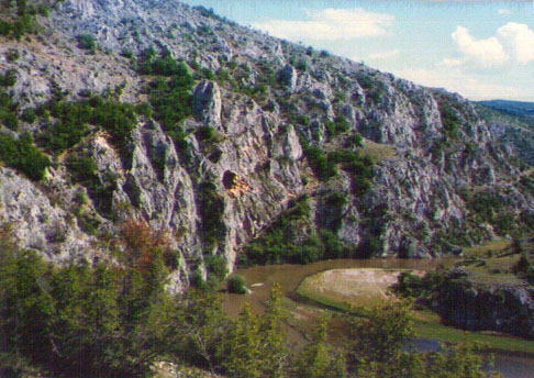 Бислимска Клисура. Фото: Милевски, 1995